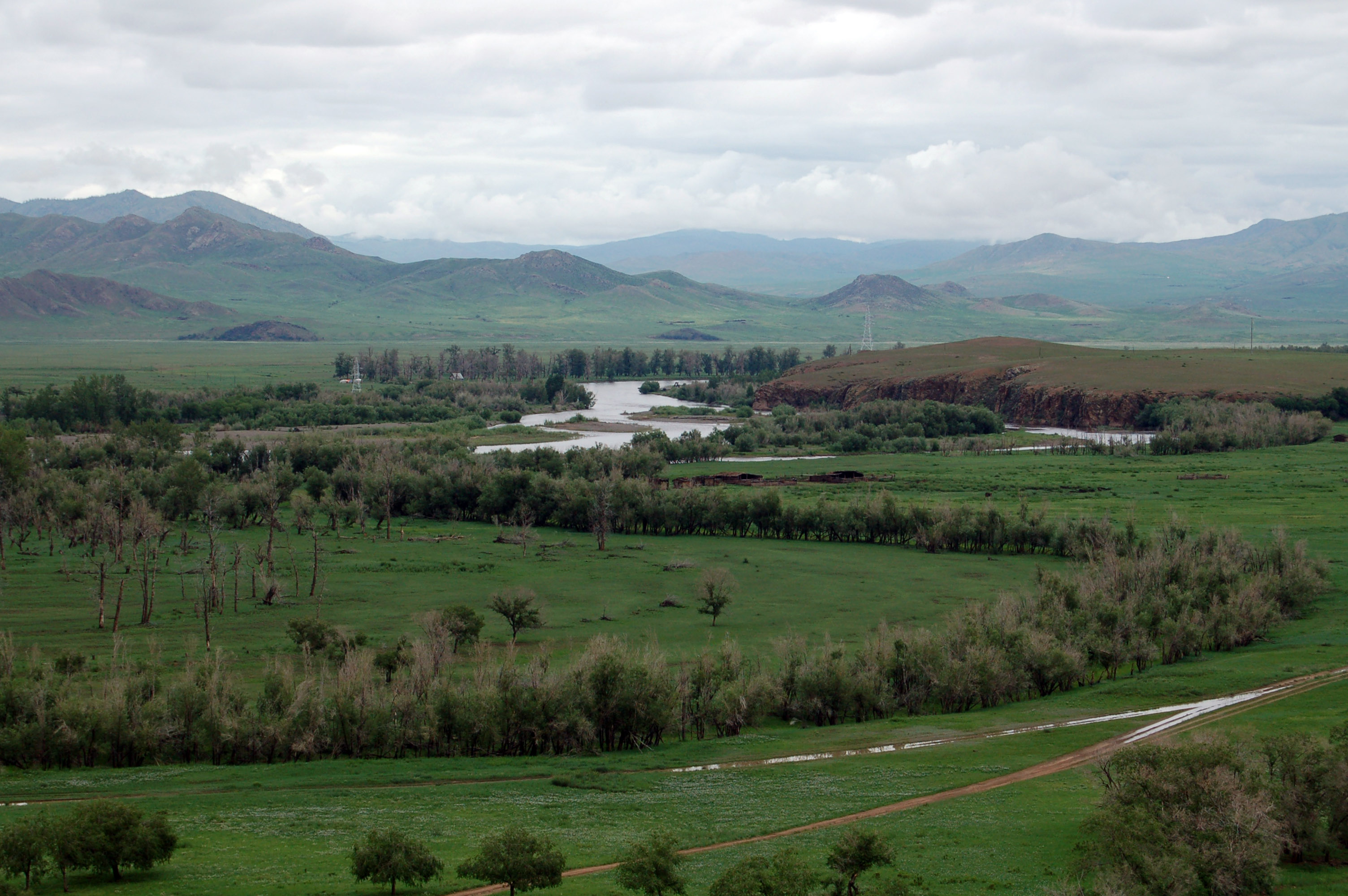 Selenge in Khövsgöl aimag